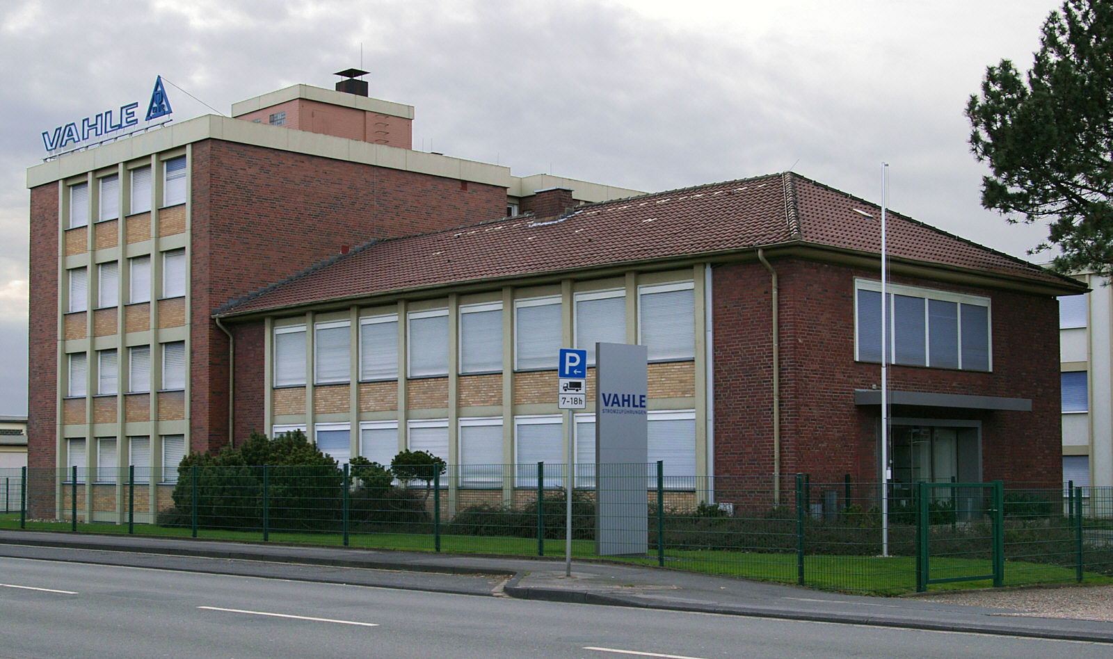 Verwaltungsgebäude des Bergbauzulieferers Vahle in Kamen, Nordrhein-Westfalen